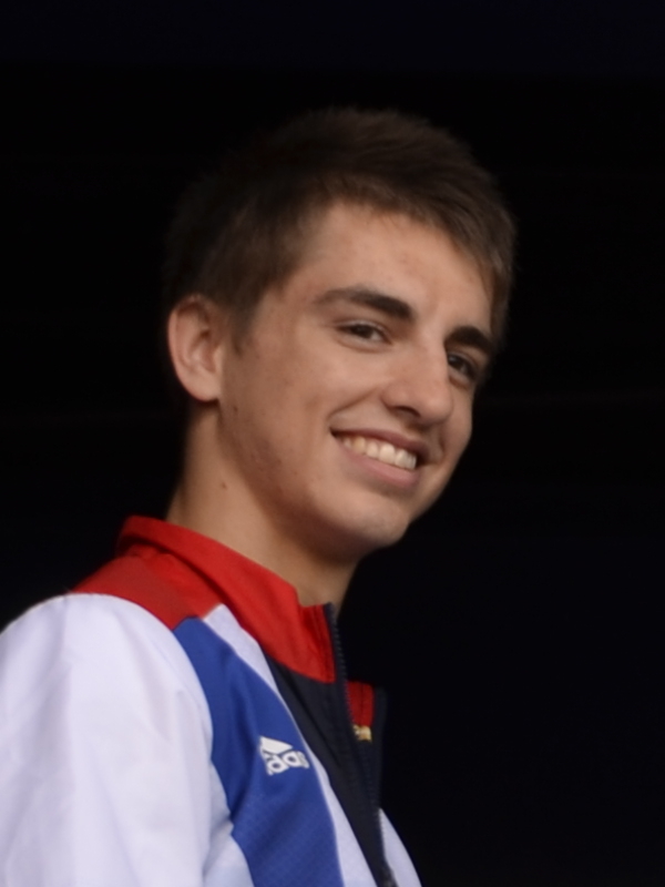 _D703960